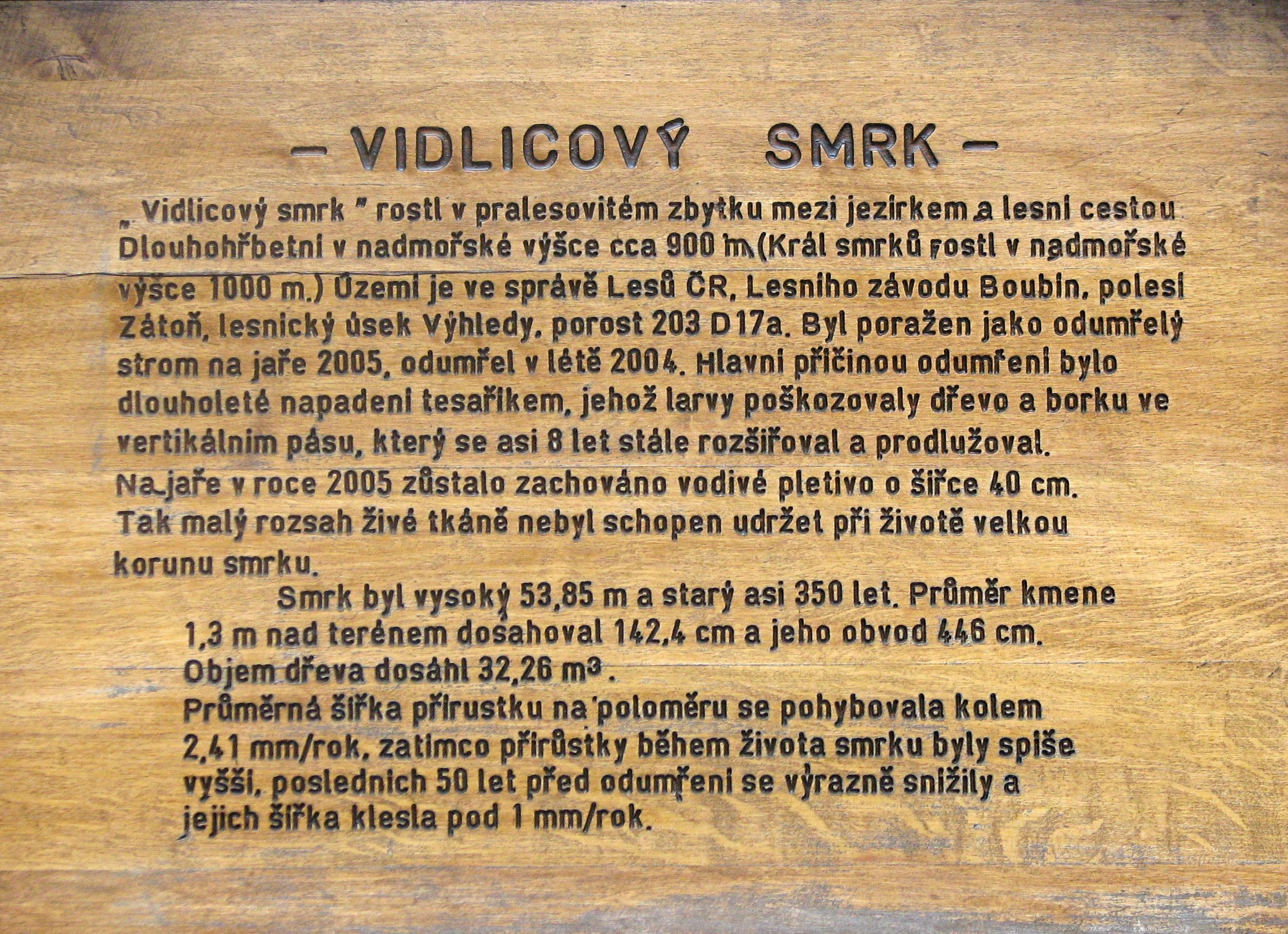 Vidlicový smrk, informacni cedule - Boubinsky prales